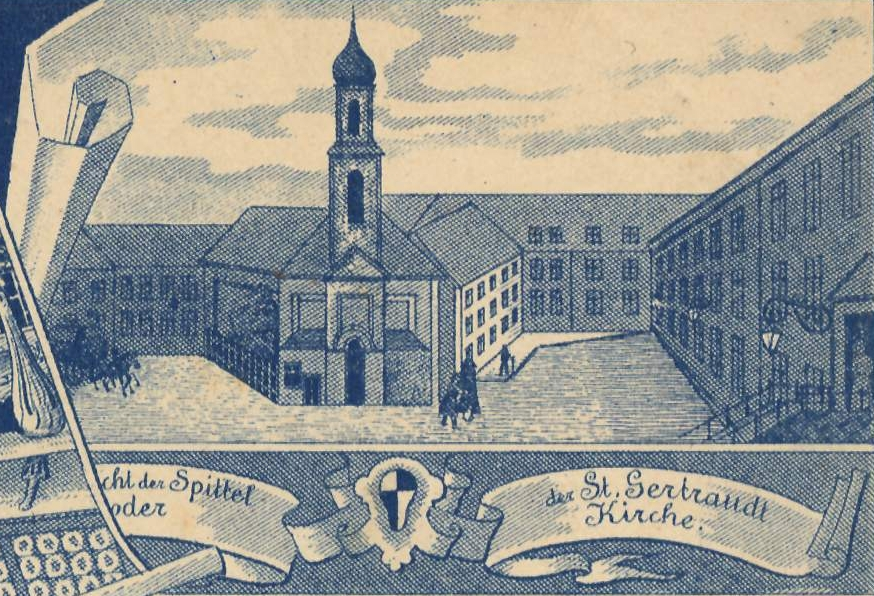 Berlin Gertraudenkirche, Ausschnitt aus bereits in Commons vorhandenem Bild